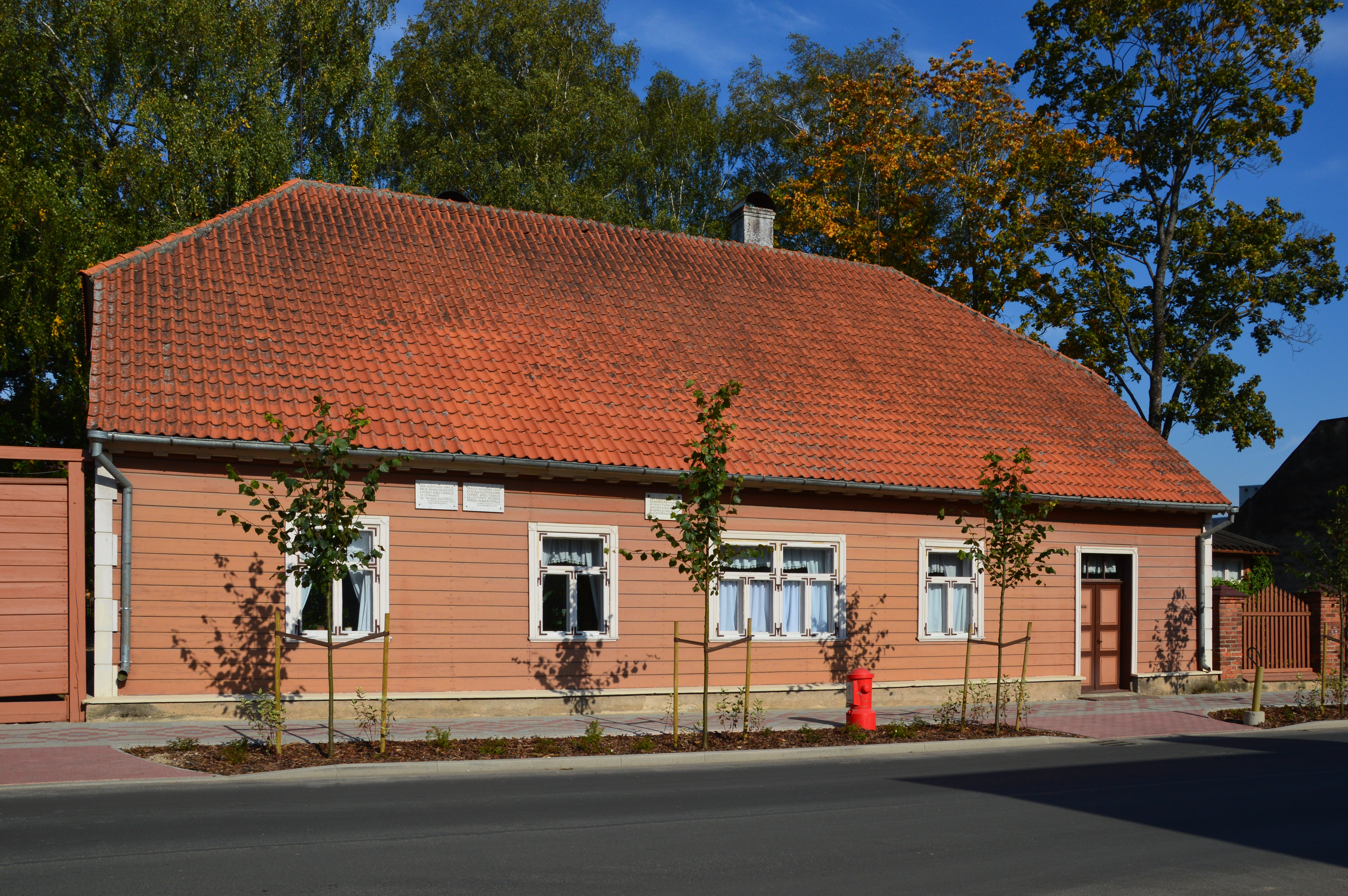 Hoonete kompleks, kus aastail 1833-1877 elas ja töötas Friedrich Reinhold Kreutzwald.